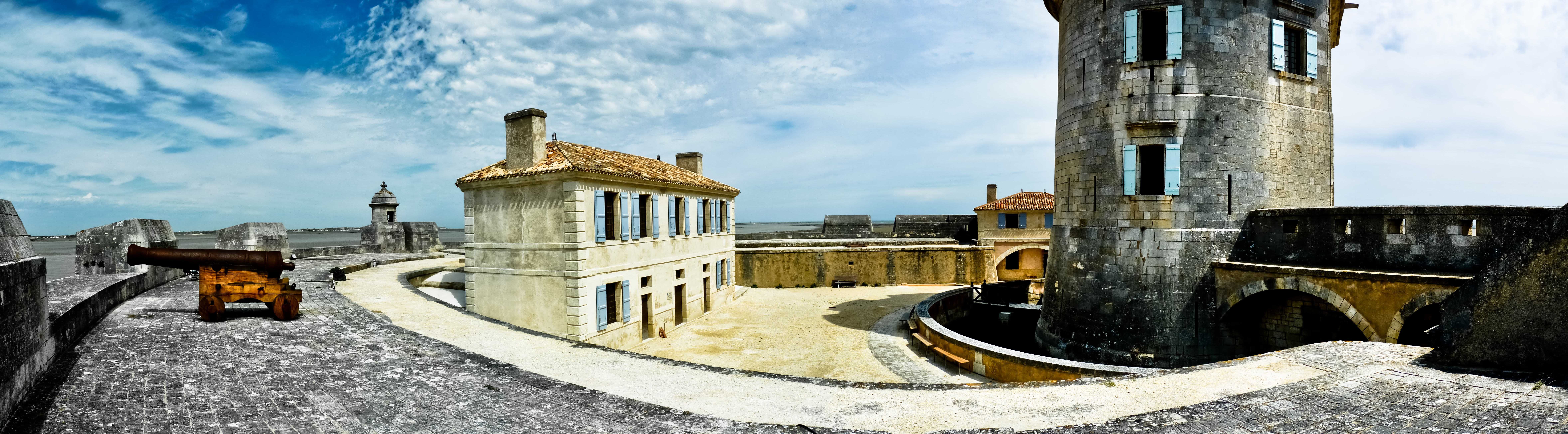 Vue de l'intérieur du Fort Louvois .